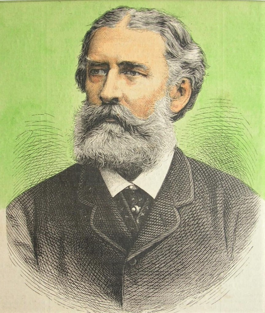 Emmerich Graf Széchenyi, k. k. österreichisch-ungarischer Botschafter in Berlin, kolorierter Holzstich, 15 x 13 cm